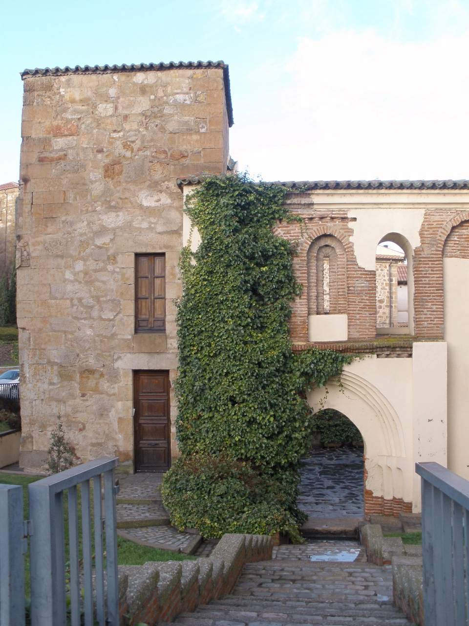 Salamanca - Antigua Iglesia y actual Hotel de San Polo